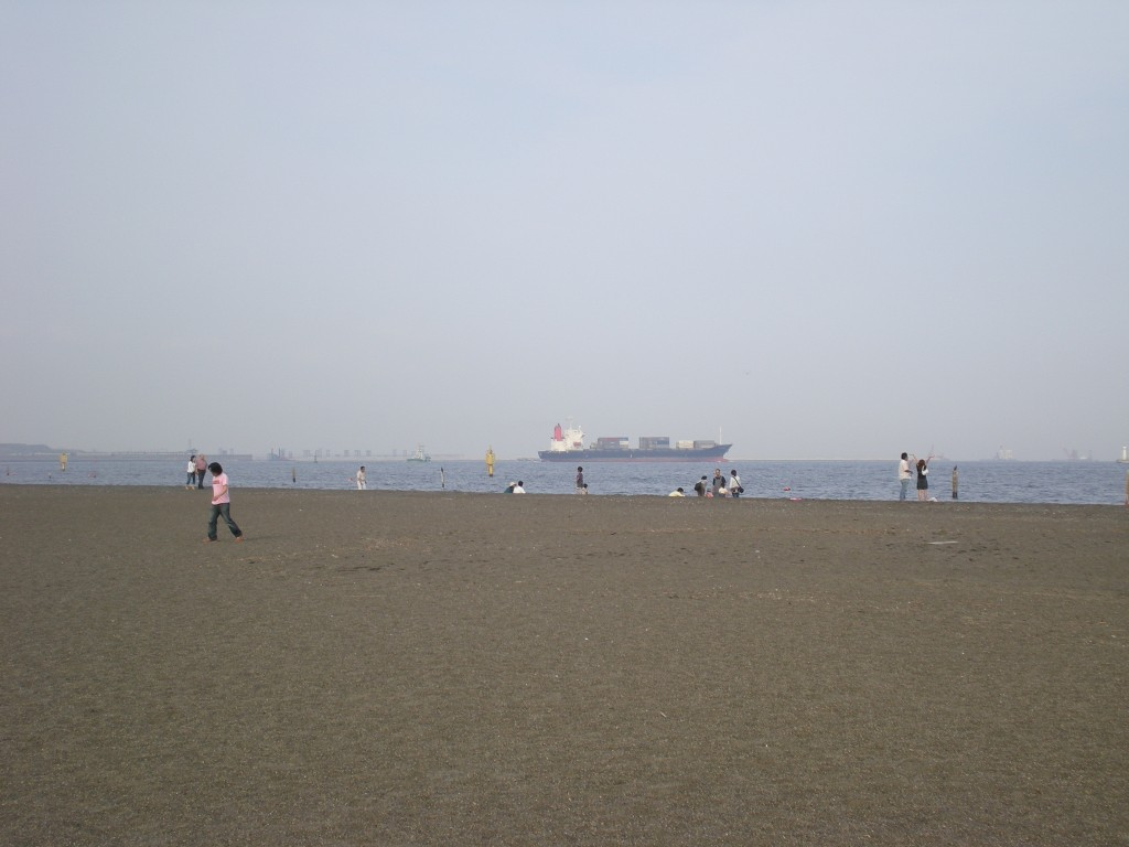 Jonanjima Kaihin Park in Tokyo